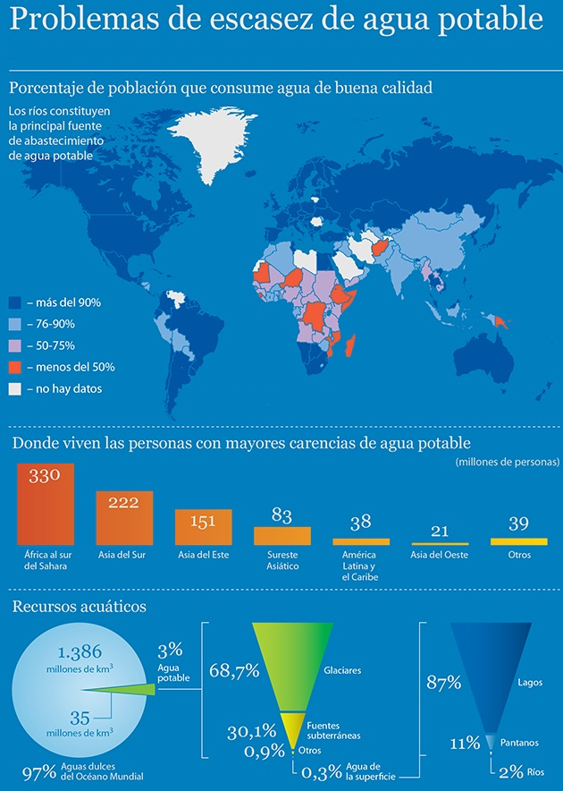 Distribución del agua en la Tierra.